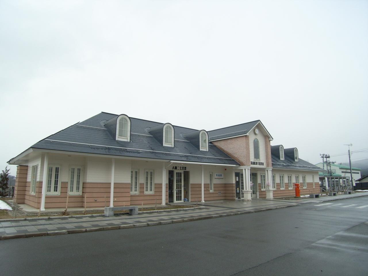 Arato Station, Shirataka, Yamagata, Japan